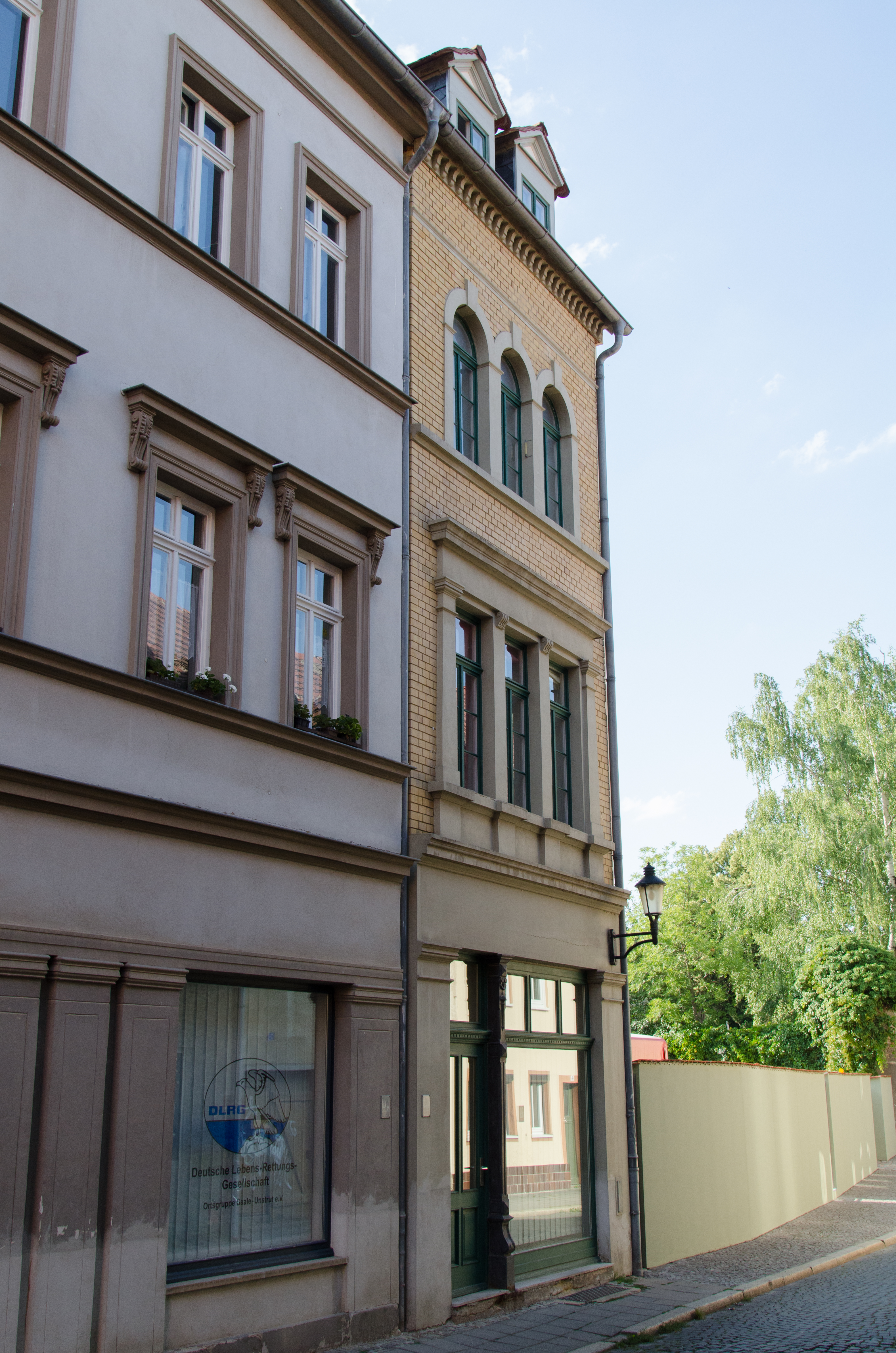 Naumburg, Mühlgasse 16